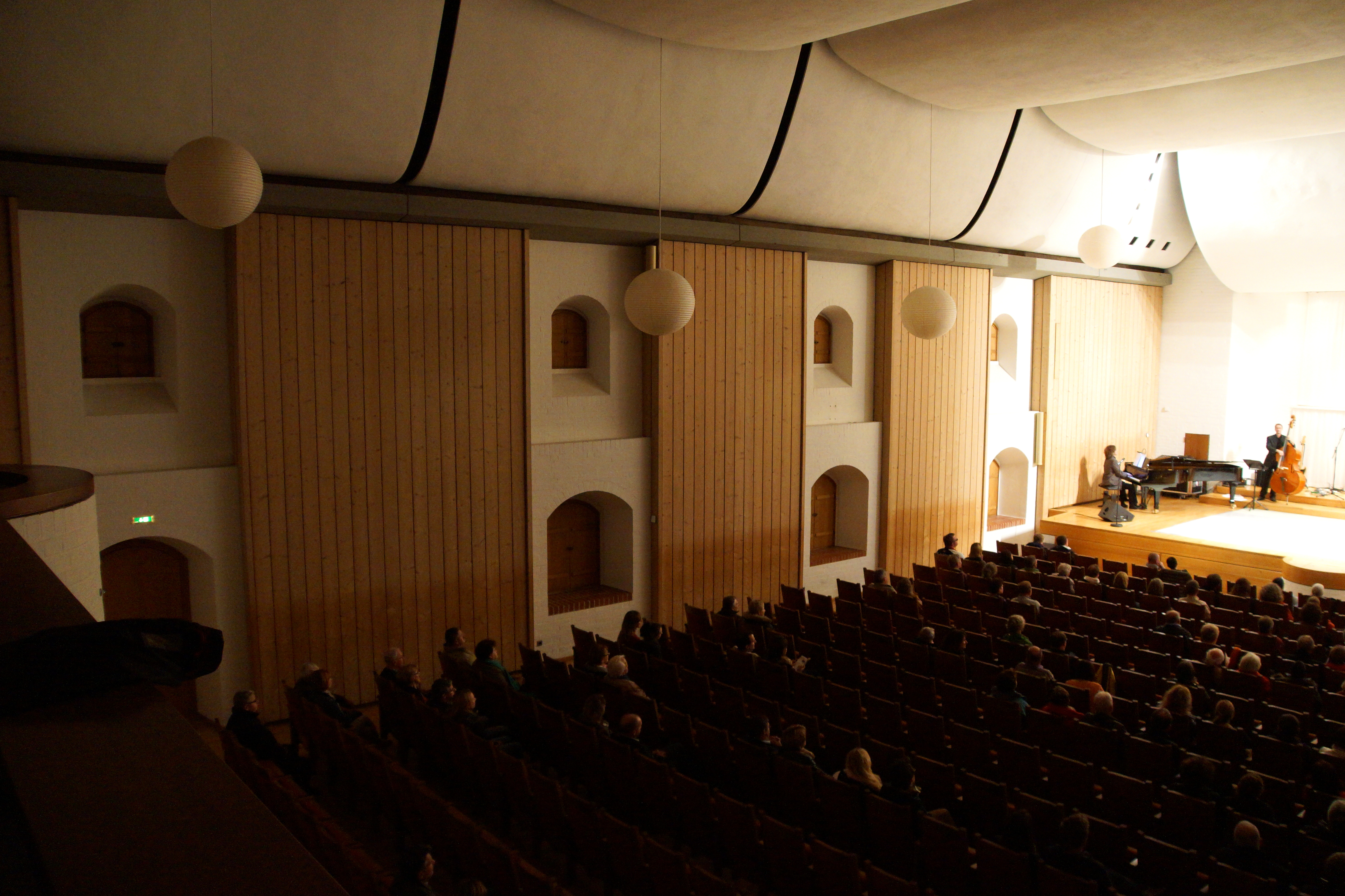 Das Konzert- und Ausstellungsgebäude der sogenannte Reitstadel in Neumarkt bei der Kulturnacht 2013